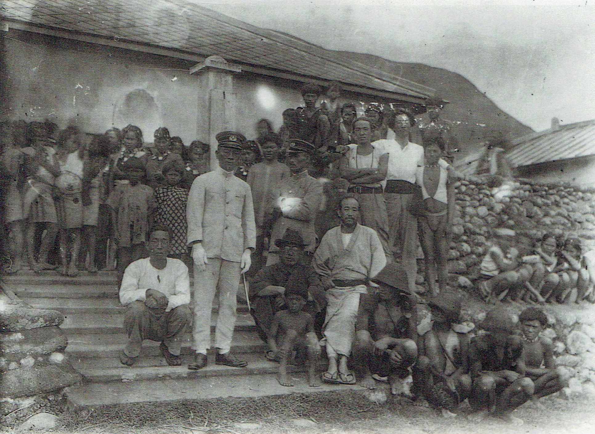 宮本延人（前左起，臺北帝國大學教官）、後藤武夫（巡查，臺東卑南族人）、小此木忠七郎（學者）、移川子之藏（臺北帝國大學教授）、田中氏（後左起，巡查）、鹿野忠雄（東京帝國大學地理科動物學學生）、馬淵東一（臺北帝國大學學生）與眾達悟族人，紅頭社駐在所前。